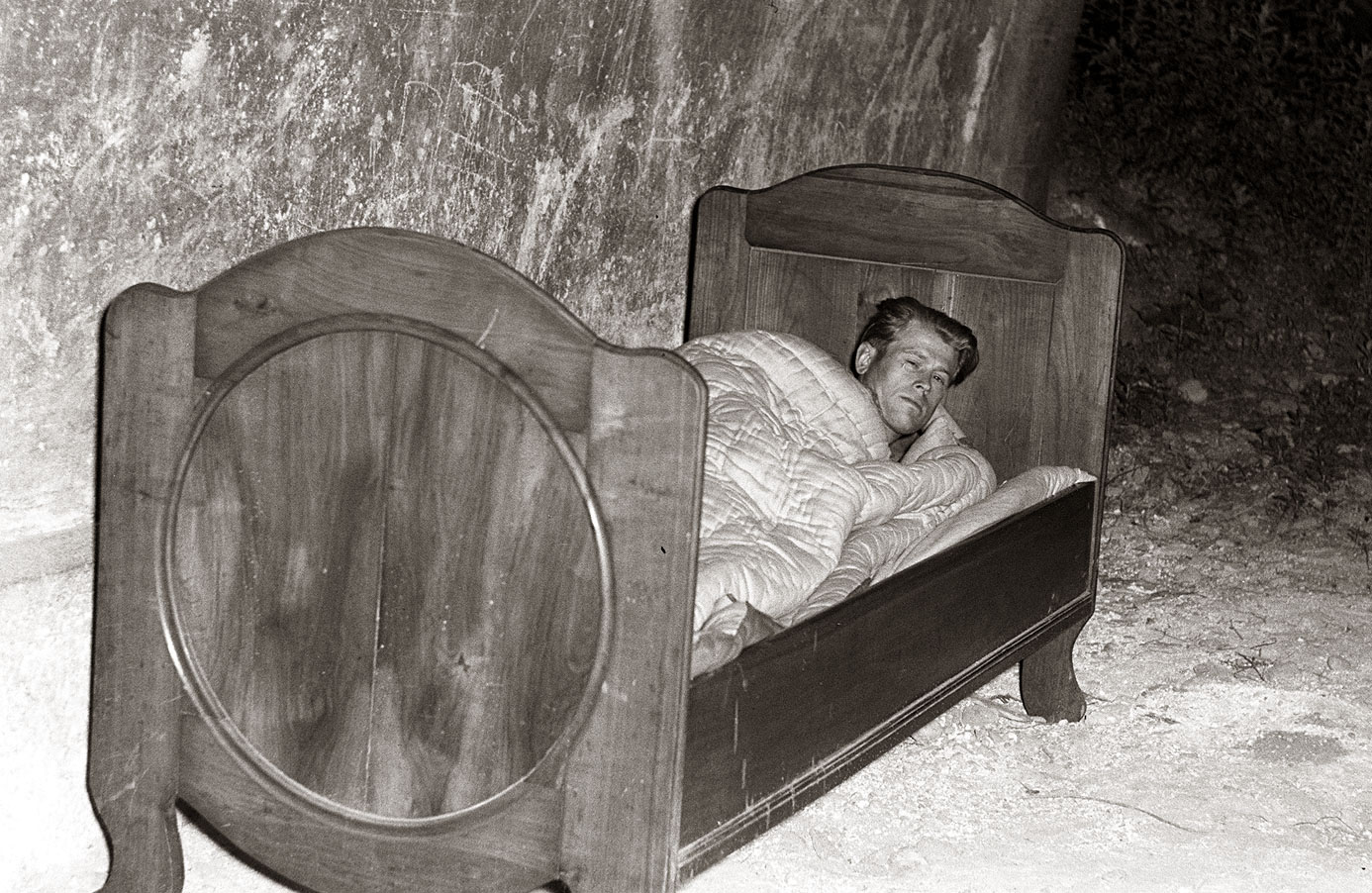 Pod prvim obokom na levi strani mariborskega glavnega mostu